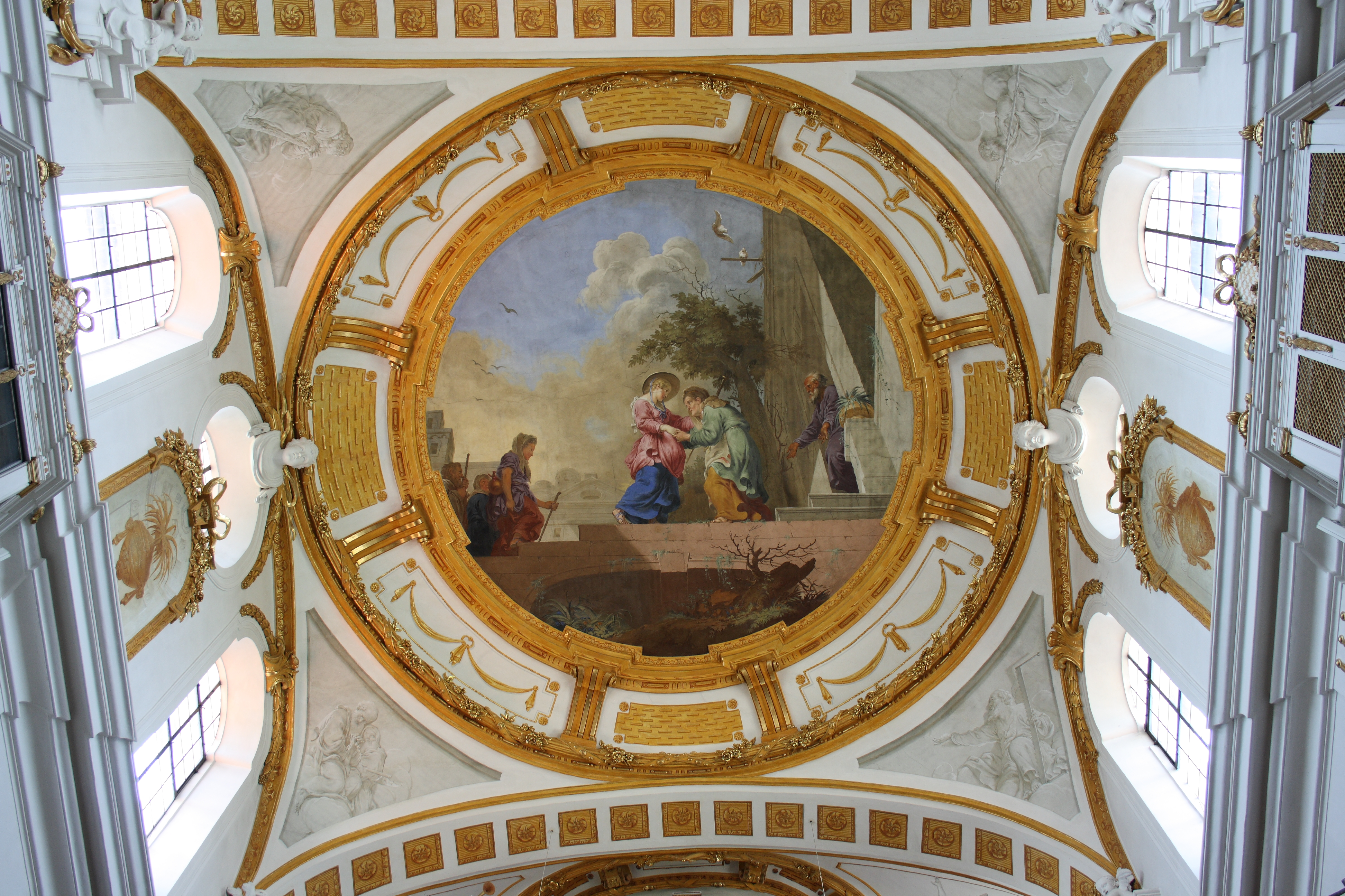 Katholische Pfarr- und Wallfahrtskirche St. Peter und Paul in Oberelchingen, einem Ortsteil von Elchingen im Landkreis Neu-Ulm (Bayern), Deckenfresko im Mittelschiff von Januarius Zick von 1782/83, Darstellung: Mariä Heimsuchung (Begegnung mit Elisabeth)